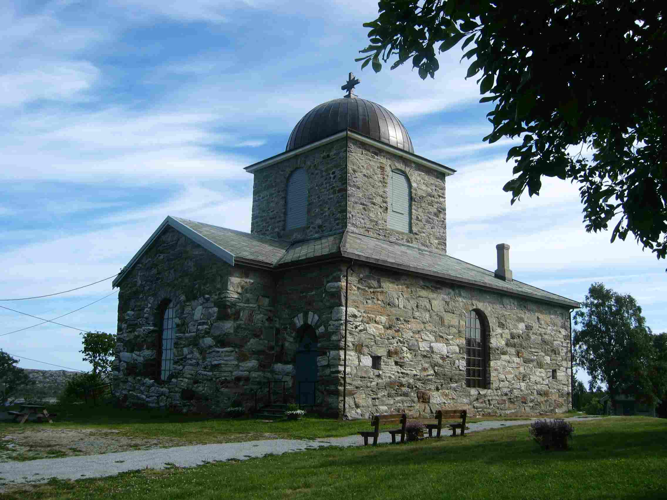 Hitra kirke in Melandsjø, Hitra, Sør-Trøndelag, Norway